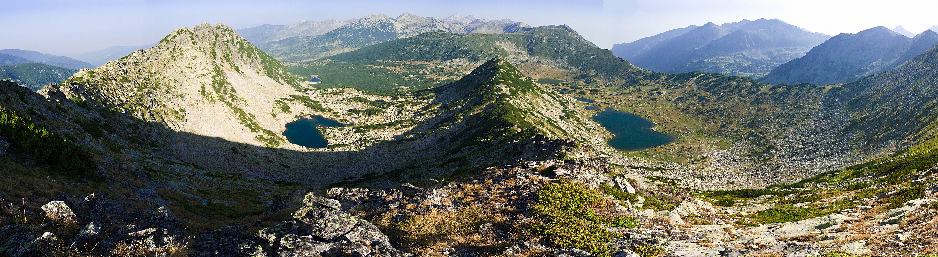 Пирин, Пирин, Чаирските езера